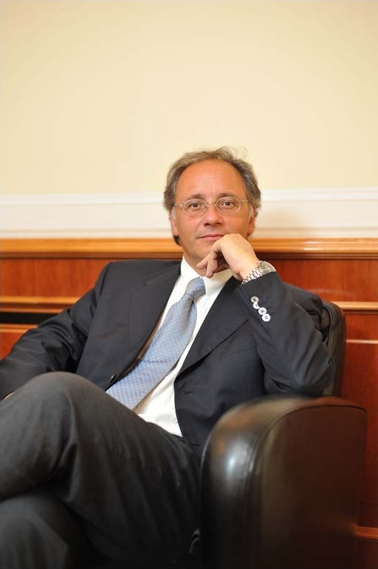 Direttore Eco di Bergamo